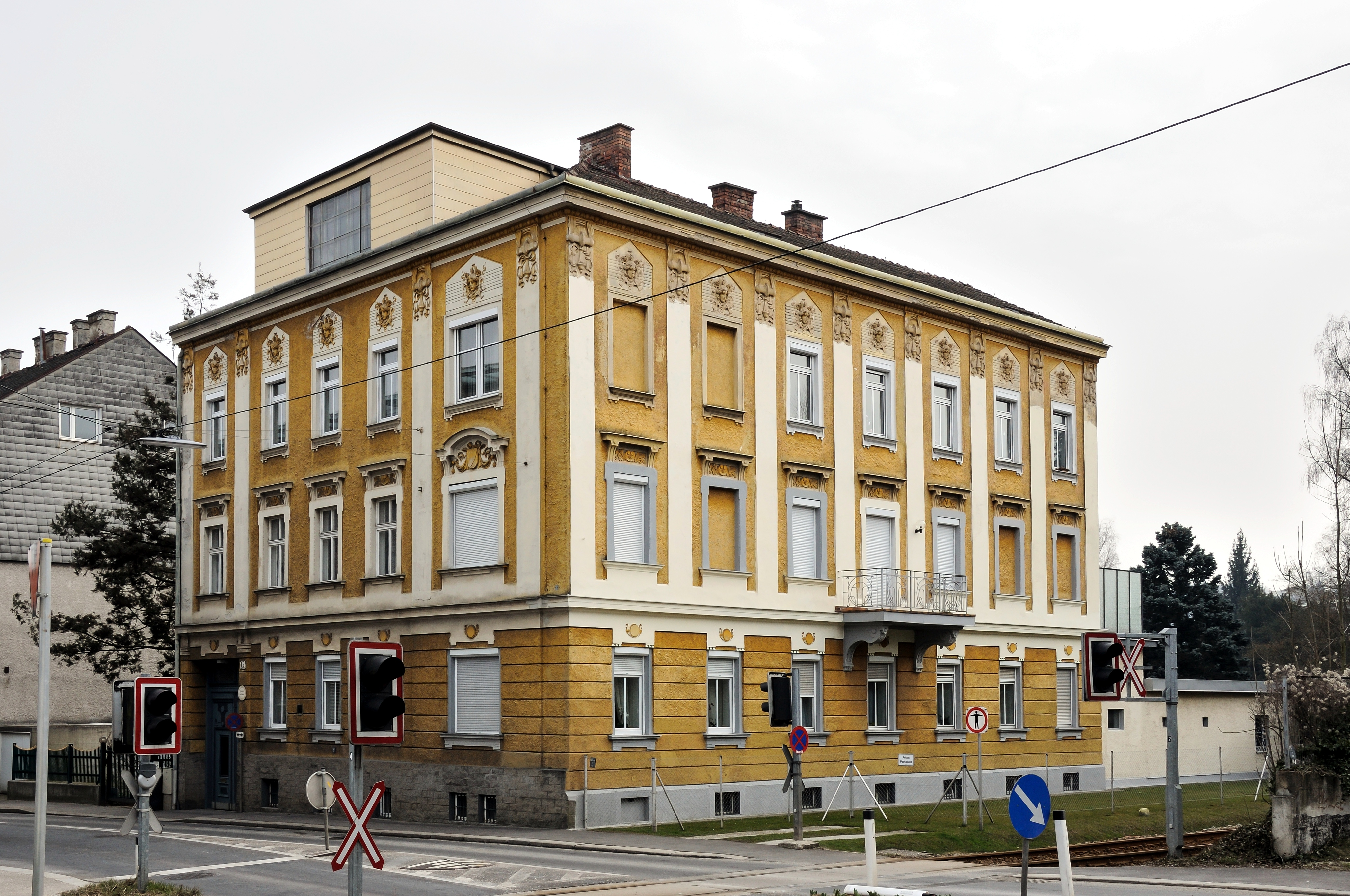 Das Haus wurde 1904 erbaut und hat eine sezessionistisch geprägte Fassade. Das Erdgeschoß ist schlicht mit genutetem Putz, die beiden Obergeschoße sind durch Mauerbänder vertikal unterteilt. Die Felder über den Fenstern des Obergeschoßes sind mit Ornamenten, Blattwerk und Mädchenkopfen dekoriert. Der Balkon an der rechten Seite des Gebäudes hat ein bemerkenswertes Jugendstilgeländer. Der nachträgliche Einbau der Dachgaube wurde 1939 von Anton Lutz zur Einrichtung eines Ateliers veranlasst.